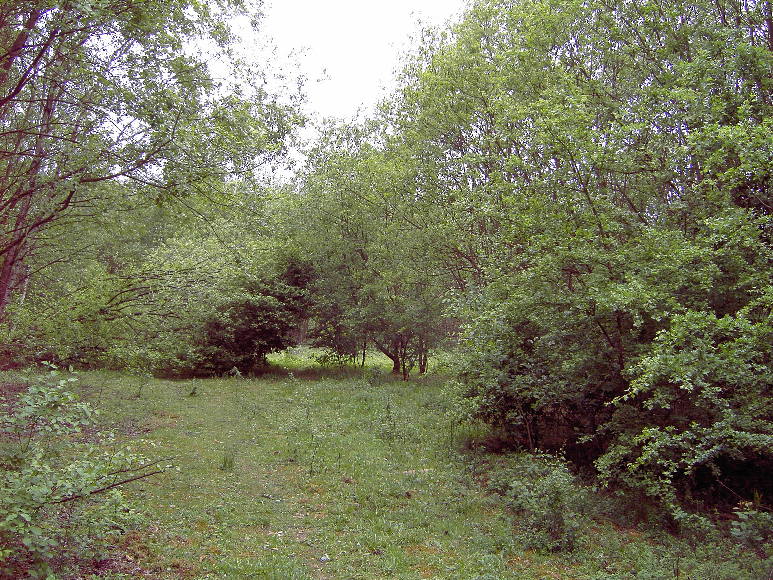 Landschaft im Naturschutzgebiet Bärenstein